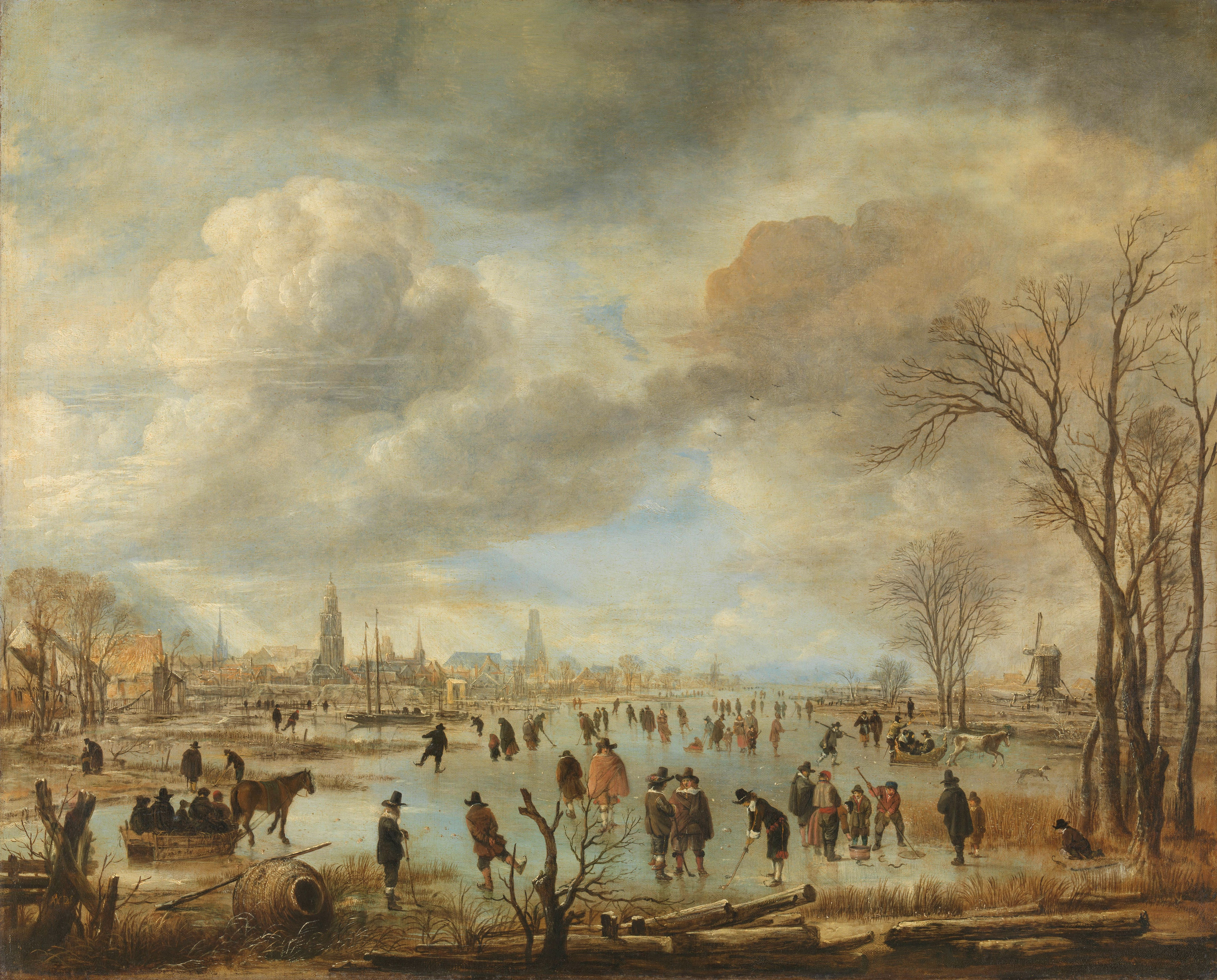 Riviergezicht bij winter. Op het ijs van een breed water buiten een stad vermaken mensen zich met kolfspelen, schaatsen en rijden in de arrenslede. Op de voorgrond een eendenkooi, rechts in de verte een molen, links de torens van de stad.